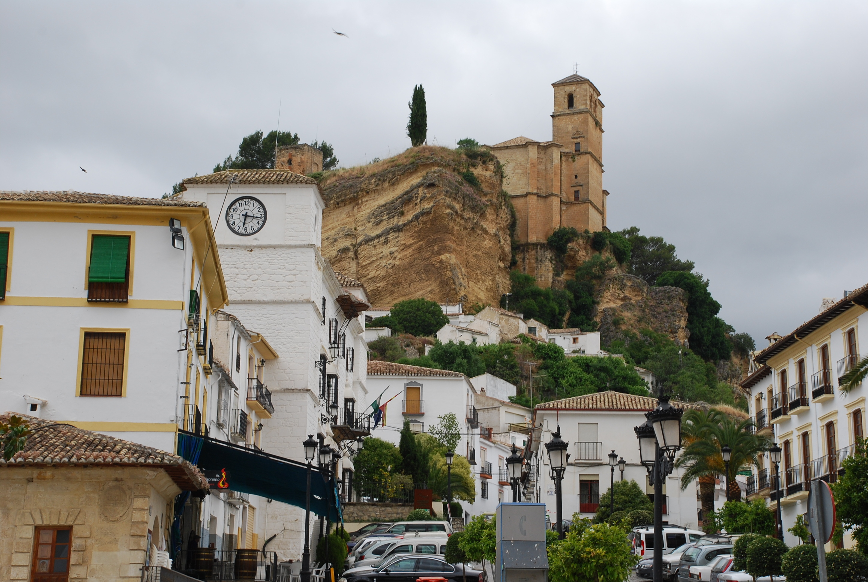 Montefrío, municipio de la provincia de Granada (España)